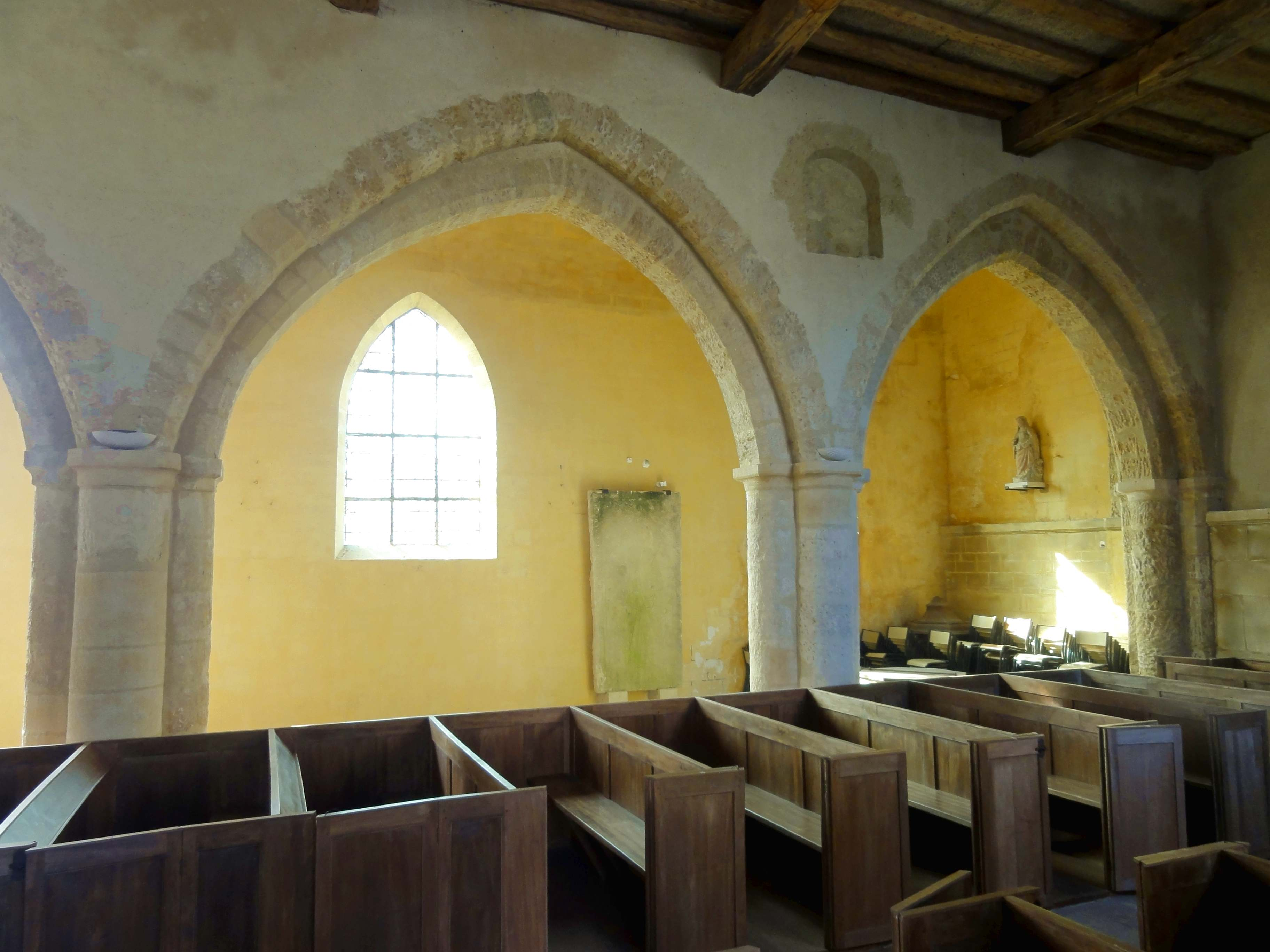 Intérieur de l'église - voir titre.